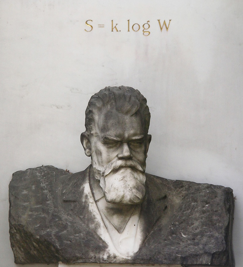 Sollte eigentlich nur ein "Schau nach, wer das ist"-Erinnerungsschnapschuss sein, kam aber schön raus. Ludwig Boltzmann. (Ludwig Boltzmann)